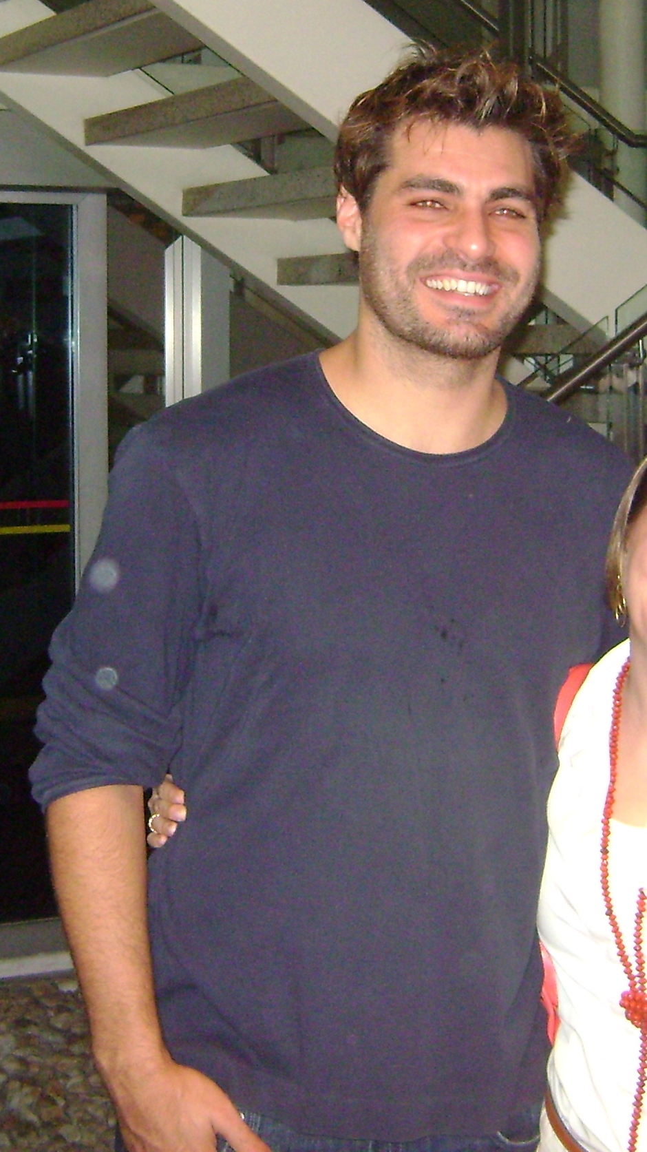 Thiago Lacerda, ator brasileiro, após a apresentação da peça "Calígula", em São Paulo.